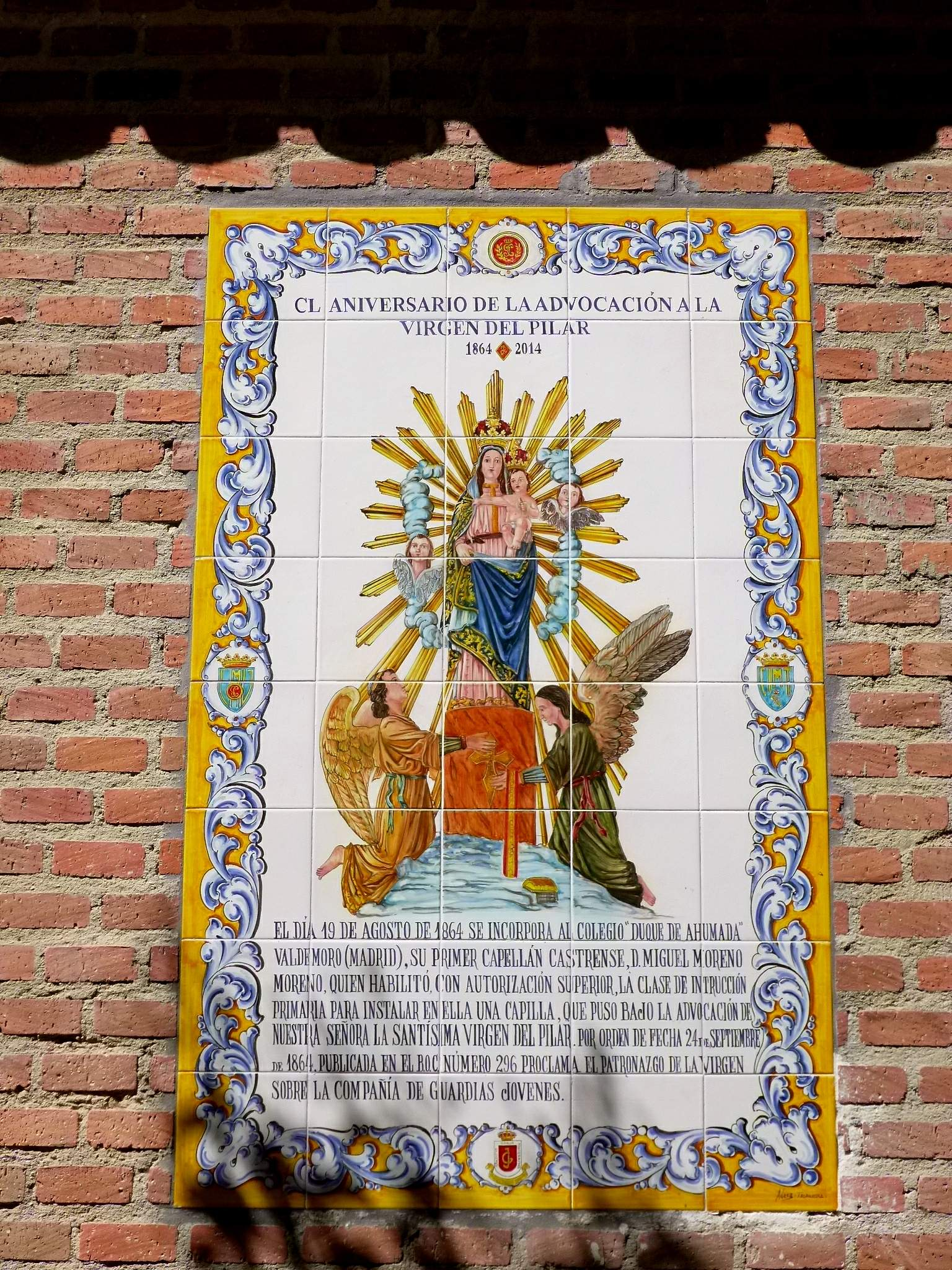 Parque del Duque de Ahumada (Valdemoro, Comunidad de Madrid)